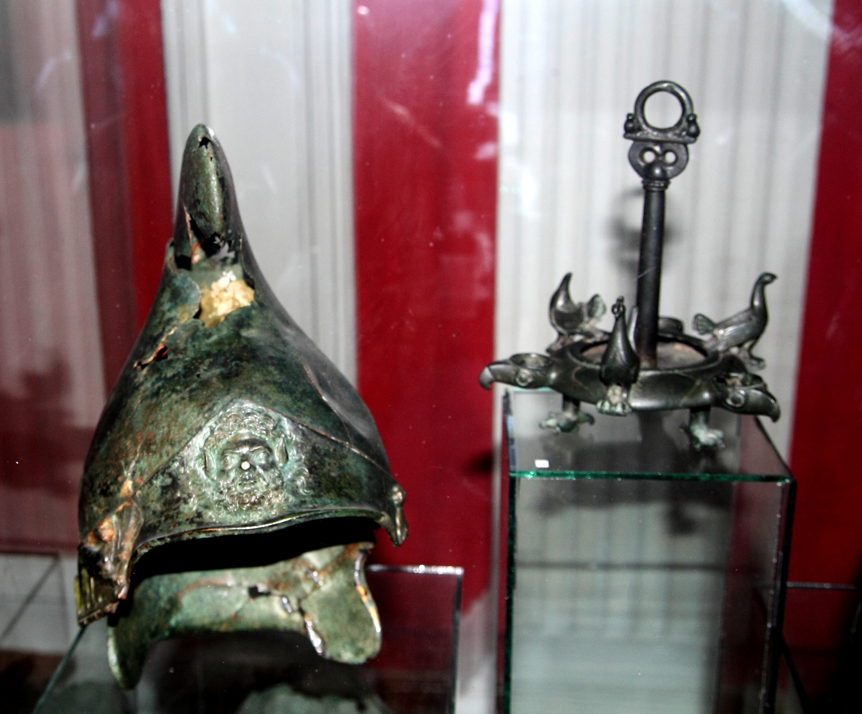 Este unicat prin componenta sa pentru intreaga Europa. A fost descoperit in anii 1960 si dateaza cu sfirsitul sec. V i. Hr. Contine 6 coifuri, 5 cnemide si un opait din bronz. La momentul descoperirii tezaurului, coifurile erau puse unul peste altul si ascundeau cea mai importanta piesa din comoara – opaitul pe care este inscriptionata in limba greaca o dedicatie templului Artemidei din Efes. Piesele au apartinut armatei lui Zoperion, unul dintre conducatorii ostii lui Alexandru Macedon.